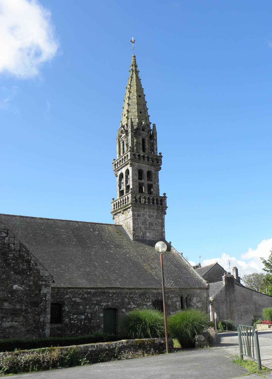 Clocher et costale nord de la nef de l'église Saint-Cornély de Tourc'h (29).